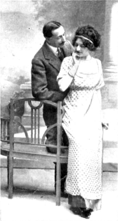 Fotografía de los actores españoles Manuel González y Mercedes Pérez de Vargas durante el tercer acto de la obra teatral de Miguel Echegaray Lucha de clases, representada en el Teatro de la Comedia de Madrid en 1911.